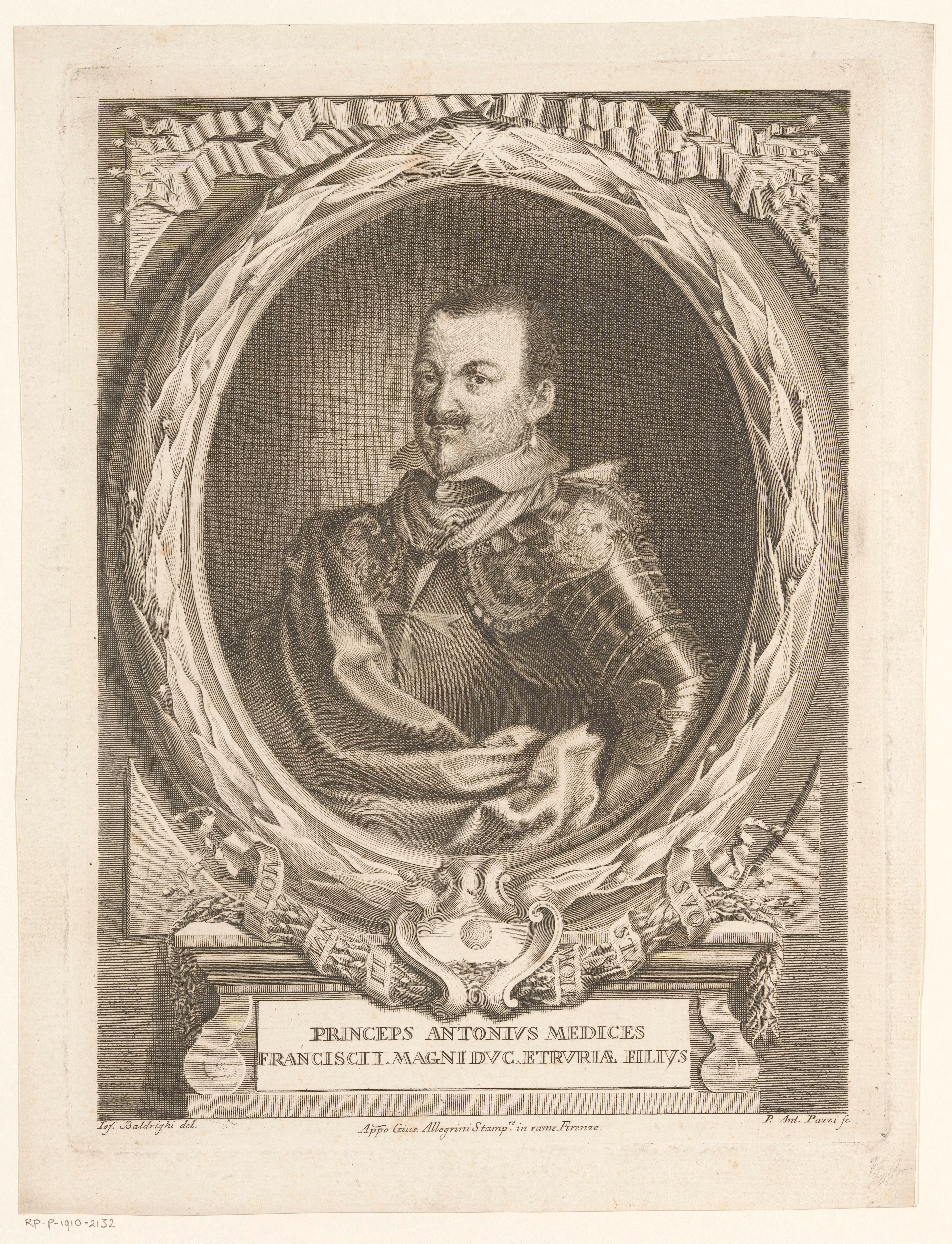 IdentificatieTitel(s): Portret van Antonio de' MediciPortretten van de familie de' Medici (serietitel)Objecttype: prent Objectnummer: RP-P-1910-2132Opschriften / Merken: verzamelaarsmerk, verso, gestempeld: Lugt 2228VervaardigingVervaardiger: prentmaker: Antonio Pazzi (vermeld op object)naar tekening van: Giuseppe Baldrighi (vermeld op object)uitgever: Giuseppe Allegrini (vermeld op object)Plaats vervaardiging: prentmaker: Italiëuitgever: FlorenceDatering: 1733 - na 1768Fysieke kenmerken: gravureMateriaal: papier Techniek: graveren (drukprocedé)Afmetingen: plaatrand: h 346 mm × b 261 mmToelichtingDeze prent maakt deel uit van een serie van onbekende omvang met portretten van de familie De' Medici. De ornamentlijst is vergelijkbaar met de ornamentlijsten door Adriaen Haelwegh in een serie van 31 prenten met portretten van de familie De' Medici.OnderwerpWat: historical personsWie: Antonio de'MediciVerwerving en rechtenVerwerving: aankoop 1910Copyright: Publiek domein